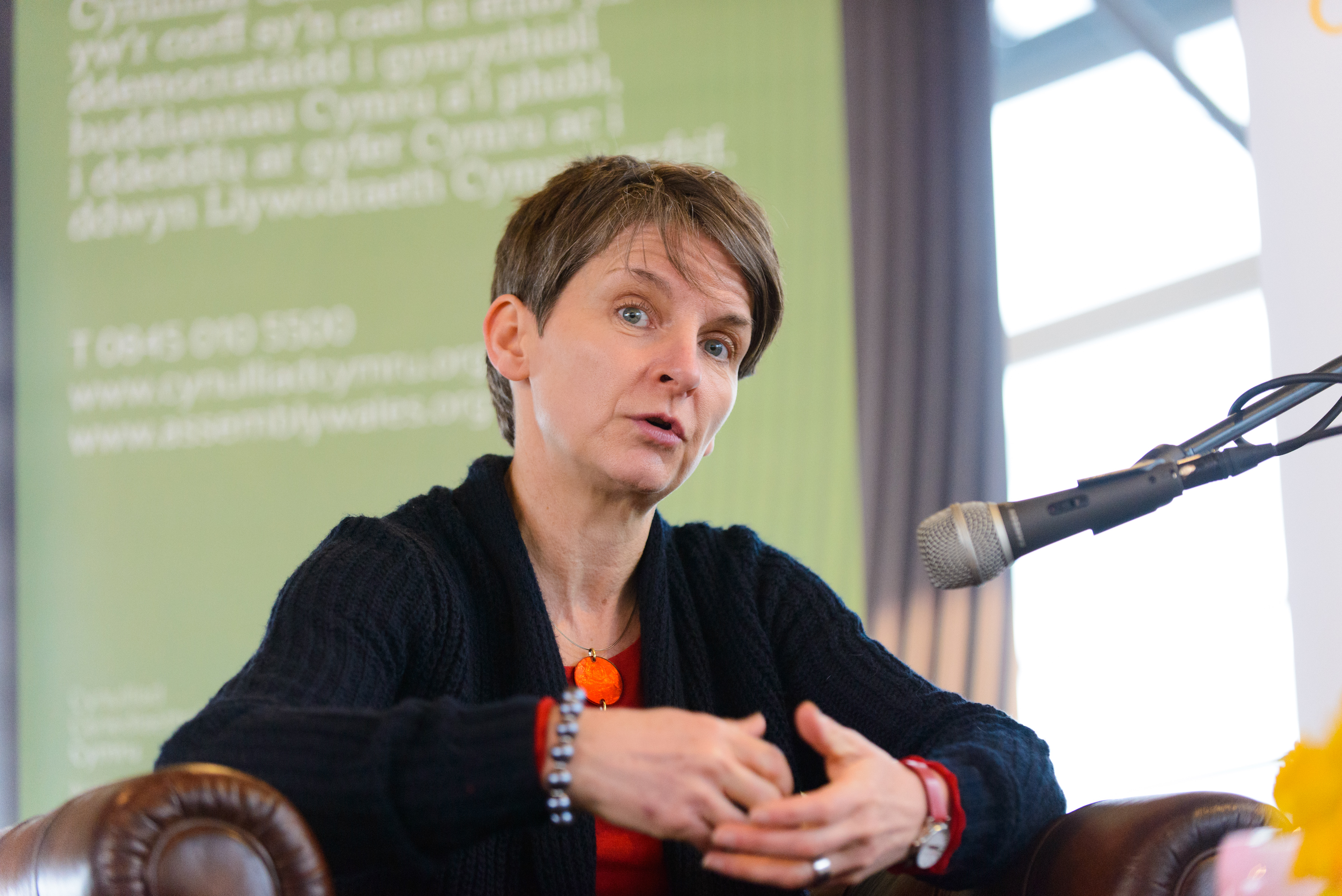 International Women’s Day, Breakfast with Professor Laura McAllister, 8 March 2013 / Diwrnod Rhyngwladol y Menywod, Brecwast gyda Yr Athro Laura McAllister, 8 Mawrth 2013